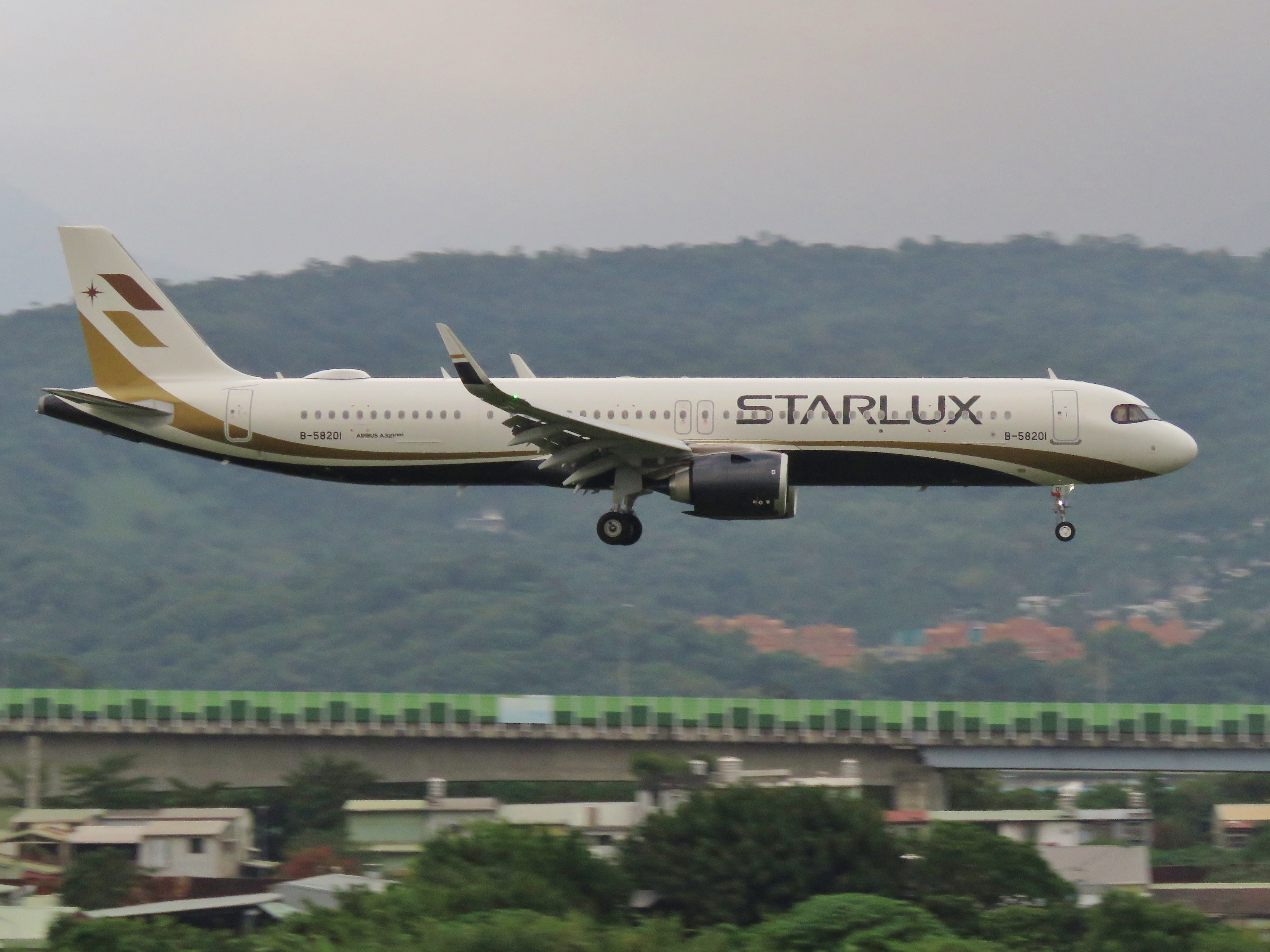 星宇航空 首架A321neo 在臺北松山機場進行訓練畫面